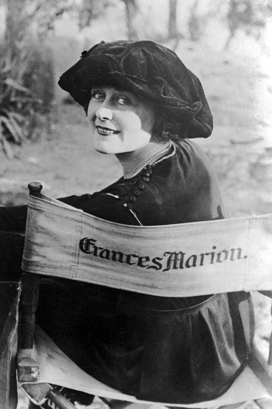 Frances Marion (18 de noviembre de 18881 – 12 de mayo de 1973) fue una periodista, escritora y guionista de nacionalidad estadounidense, a menudo citada como una de las más renombradas mujeres guionistas del siglo XX, junto a June Mathis y Anita Loos.